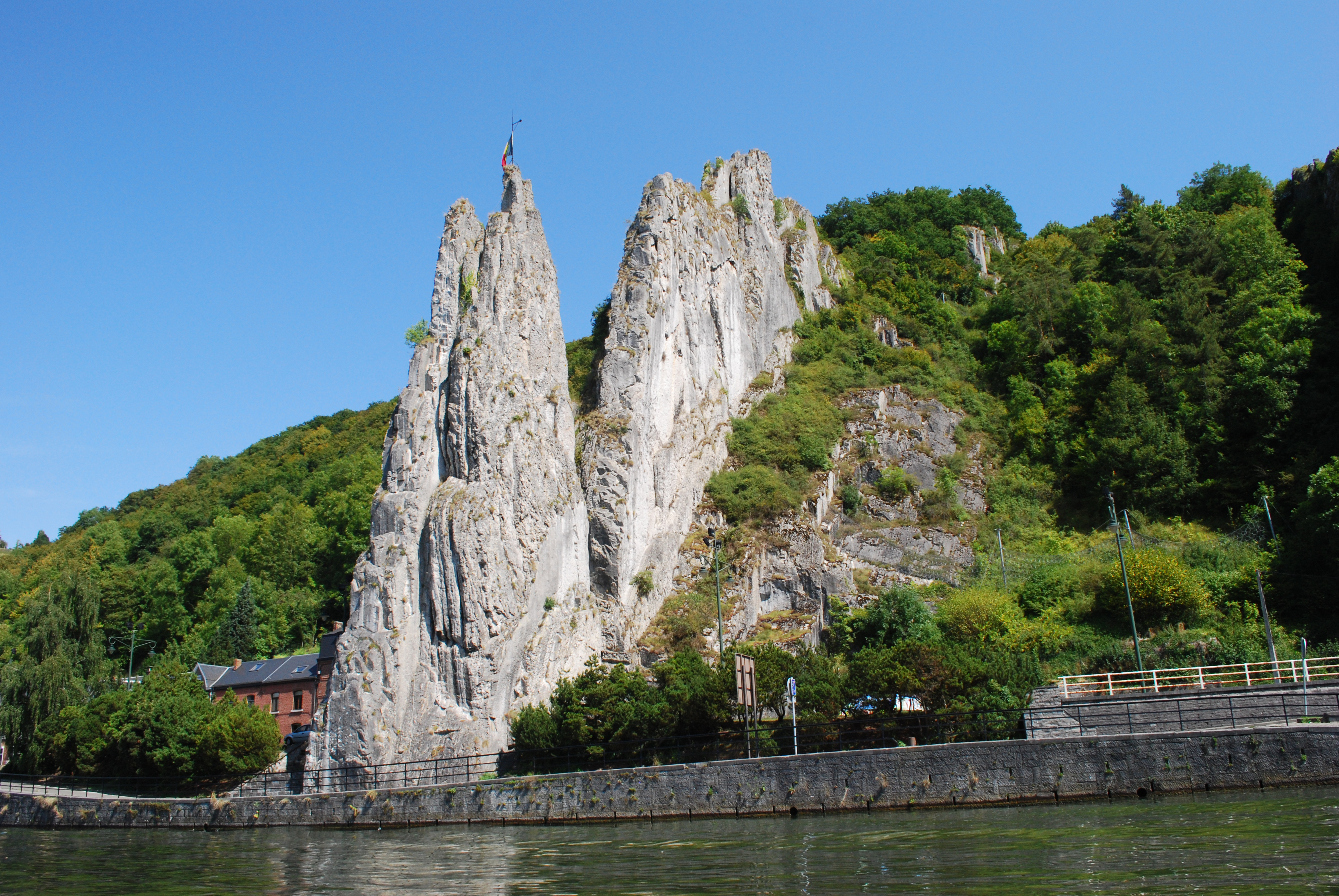 Dinant : la Meuse, rive droite, le rocher Bayard.